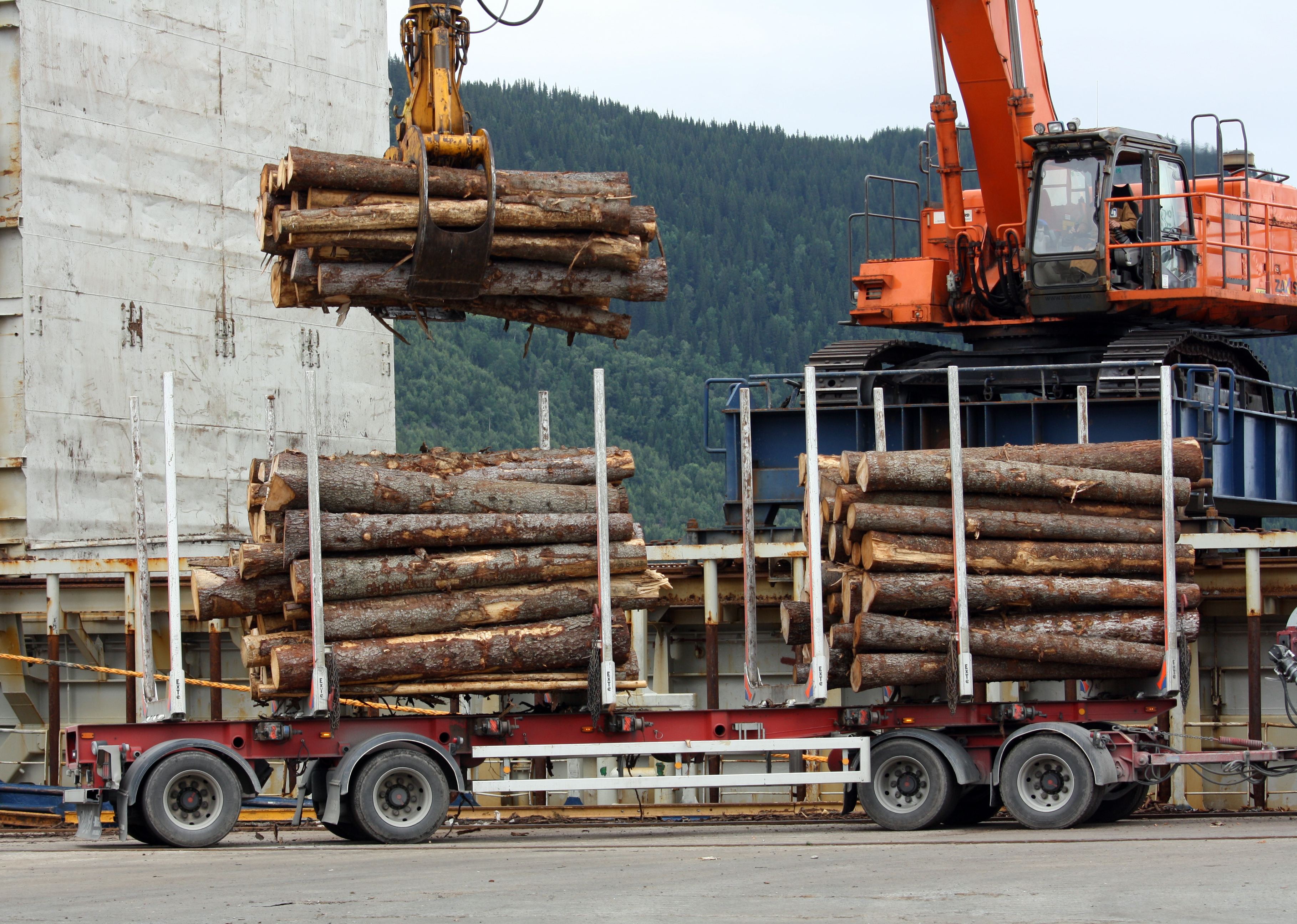 Tømmer lastes i Orkanger havn med kurs for Norske Skog på Skogn.